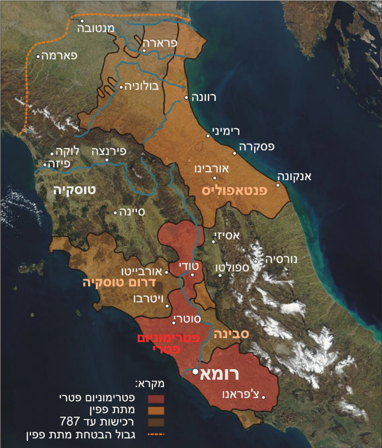 La bildo estas kopiita de de. La originala priskribo estas: Darstellung zeigt die Ausdehnung des Kirchenstaates um 800 Zeichnung erstellt 2003 von Benutzer:Sansculotte. Bild ist unter der GNU FDL zur weiteren Verwendung freigegeben. Quellenangabe und Beleg an erbeten.